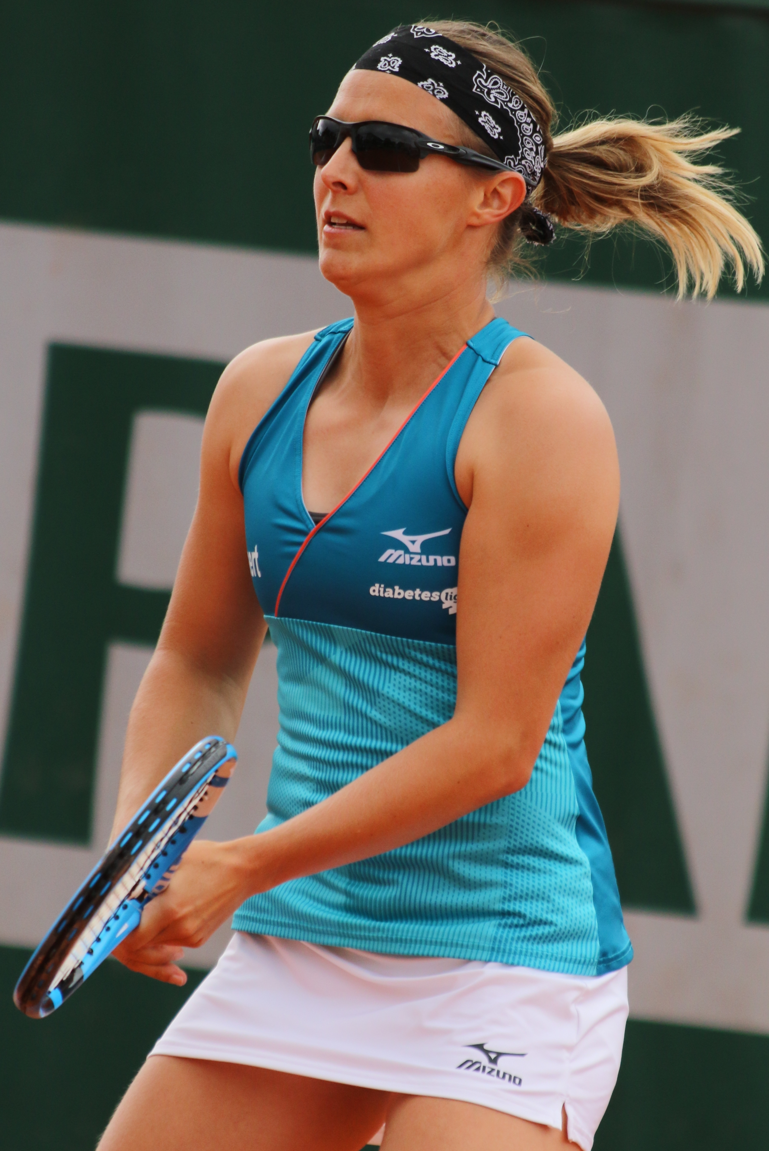 Flipkens RG19 (4)